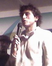 Foto di Marco Mordente